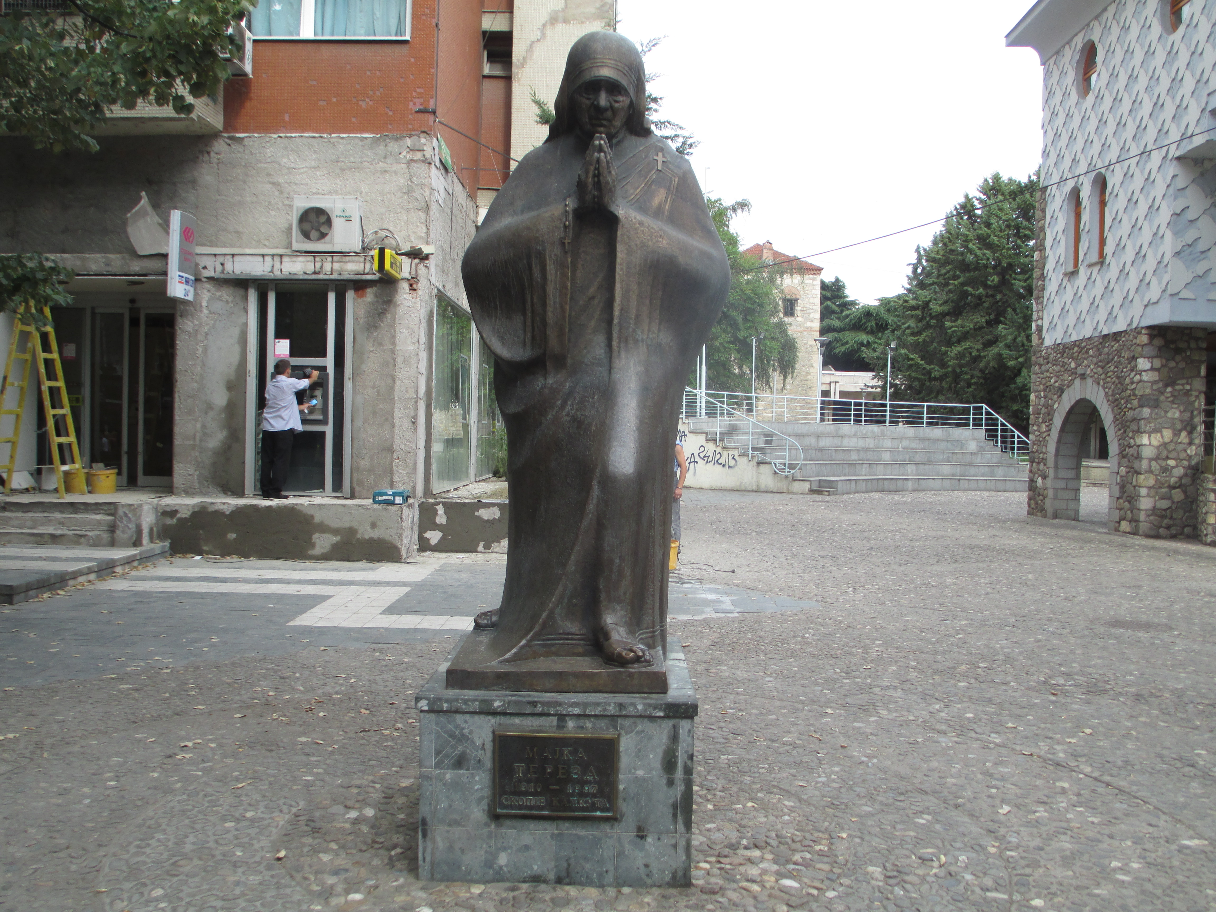 פסל האם תרזה בסקופיה, מקדוניה